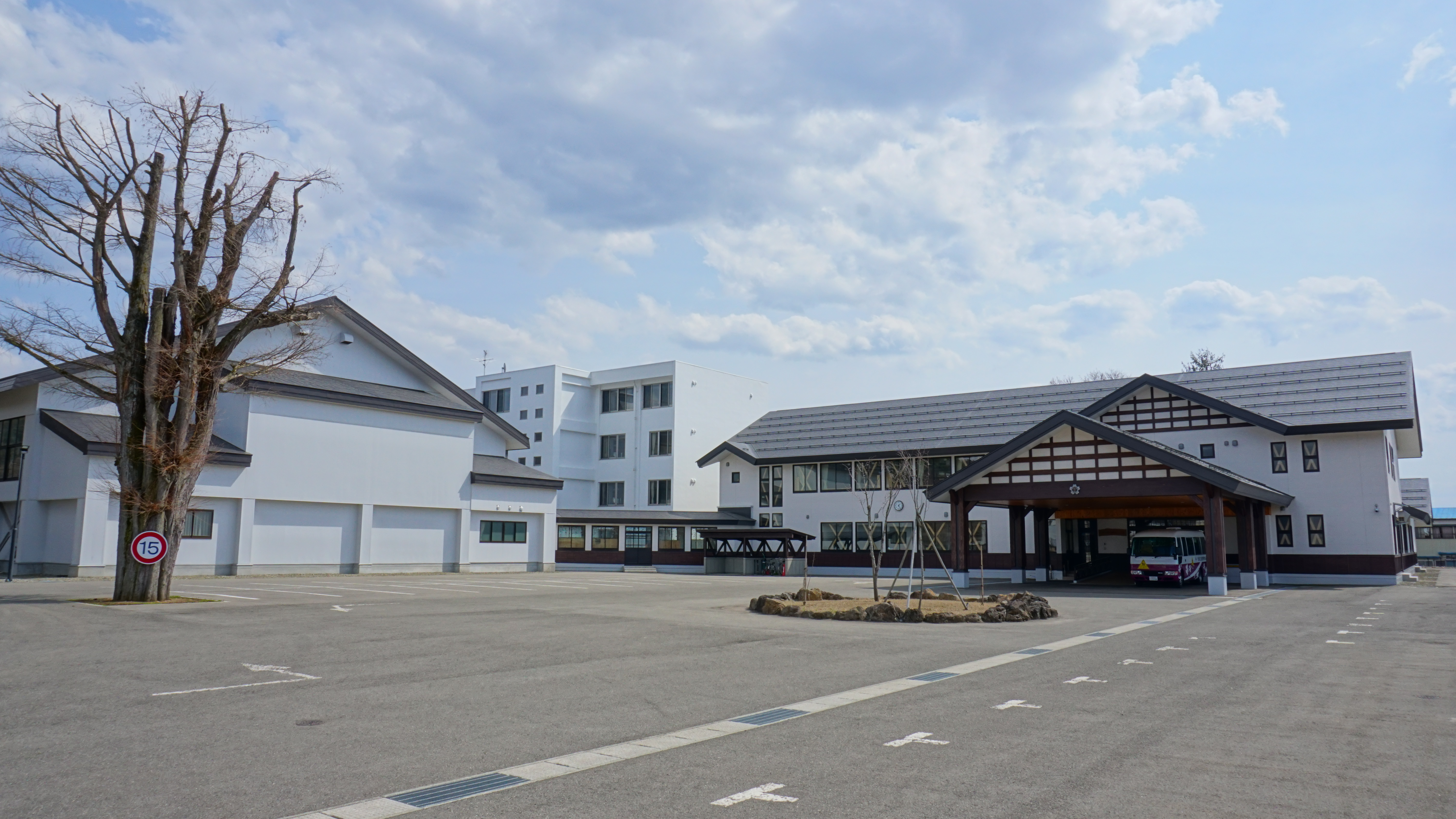 秋田県立大曲支援学校せんぼく校